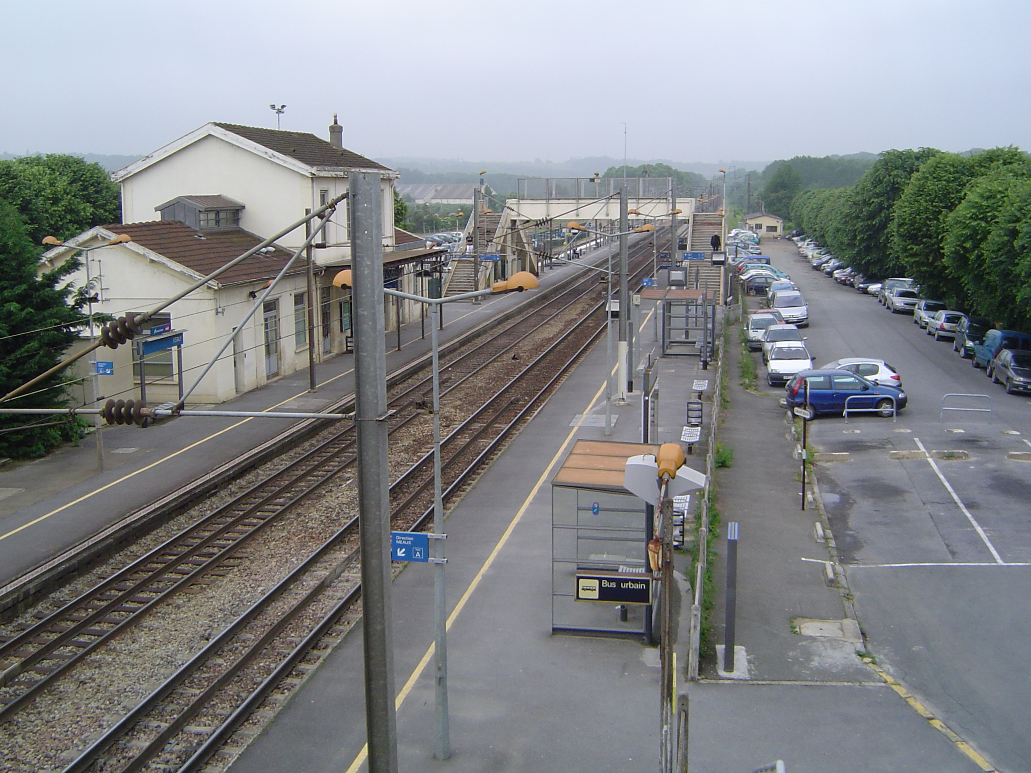 La gare SNCF d'Esbly